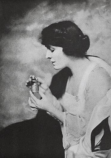 Jane Grey